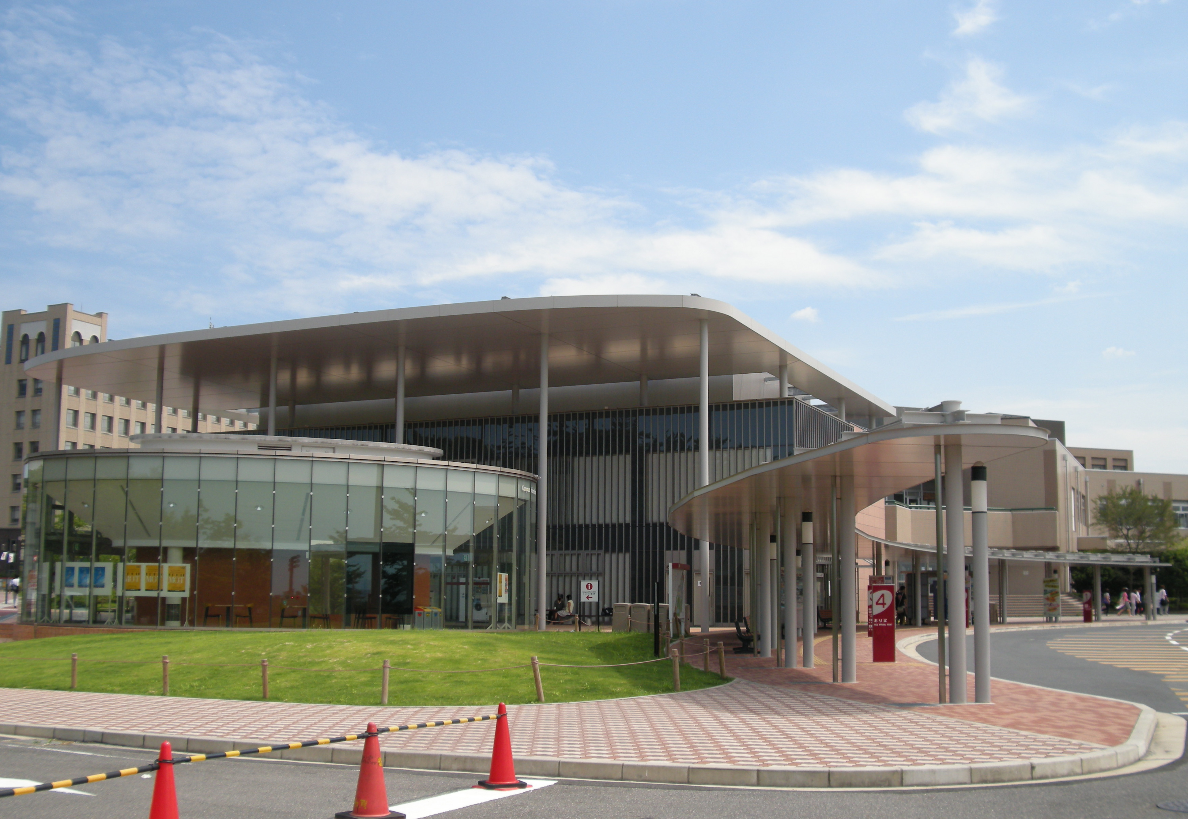 Canopy and Bus Terminal, (Biwako Kusatsu Campus, Ritsumeikan University, Japan)